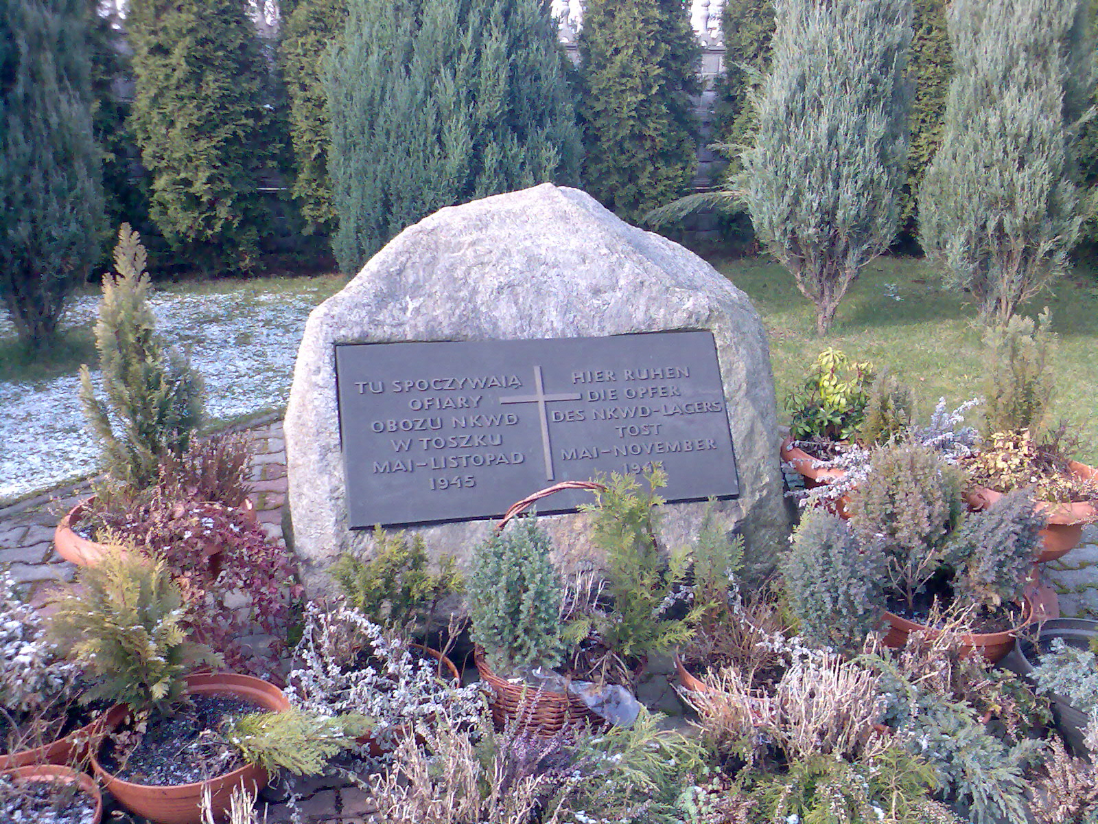 Toszek-Massengrab der Opfer des NKWD Lagers Tost